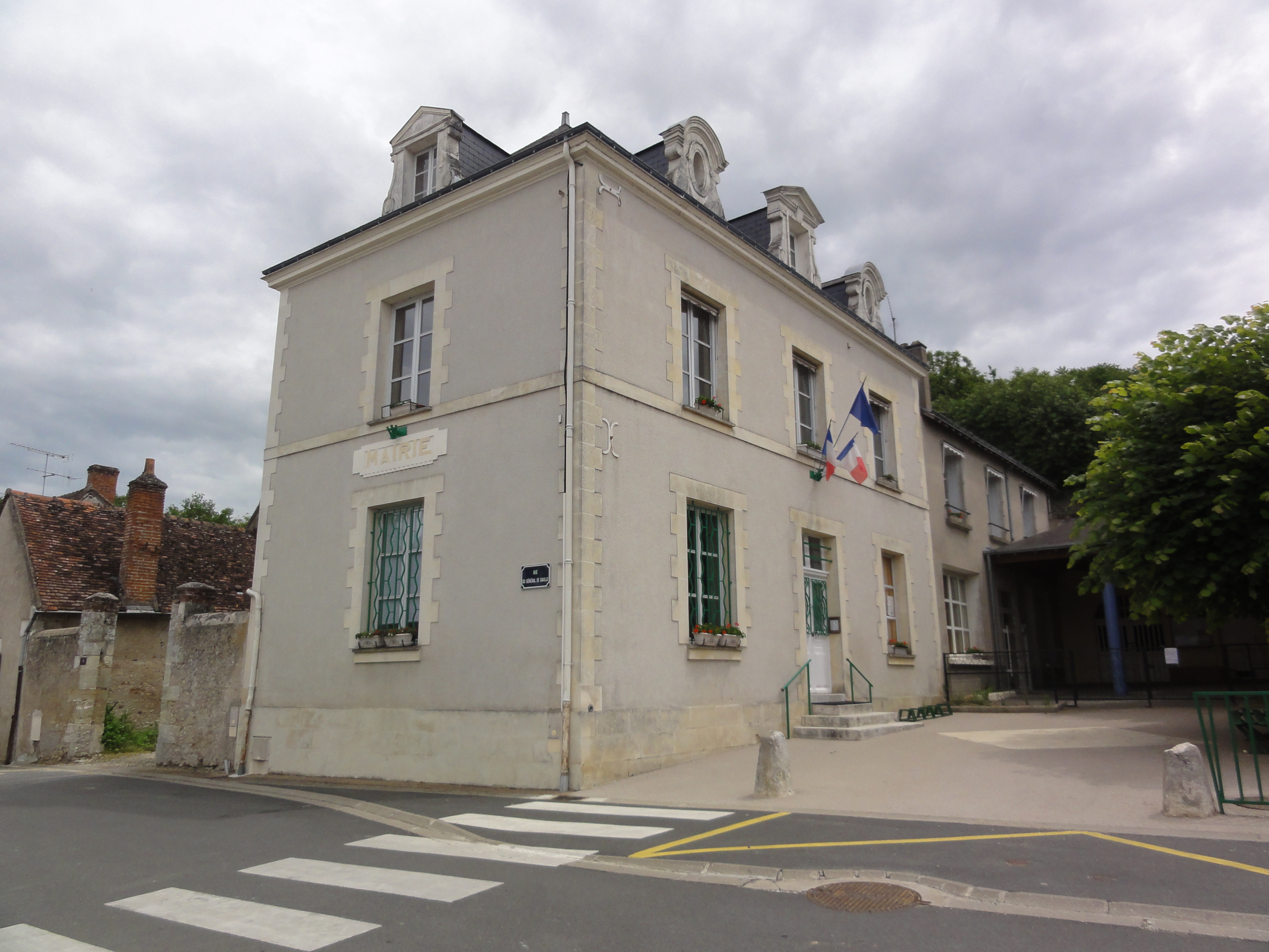 Chargé (Indre-et-Loire) Mairie